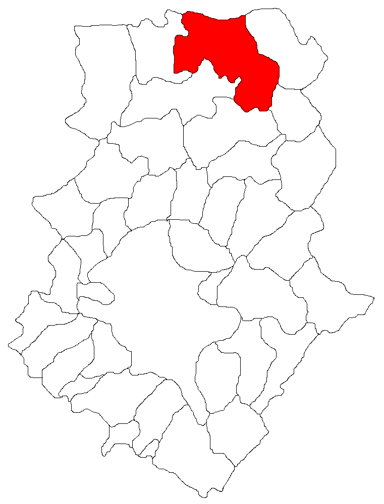 Volapük: Topam in ziläk: Ilfov.